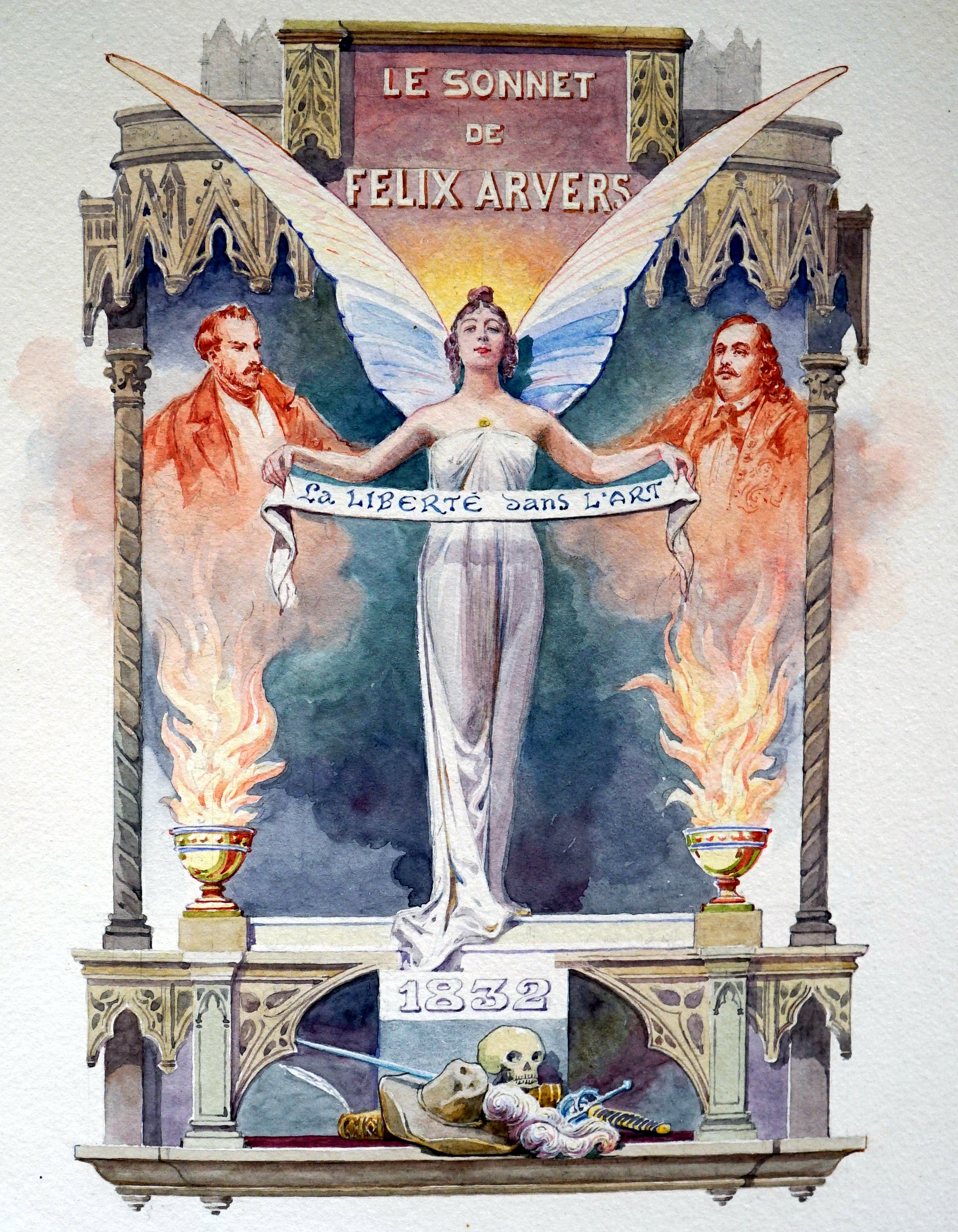 oeuvre calligraphiée et décorée par Auger pour Diancourt.